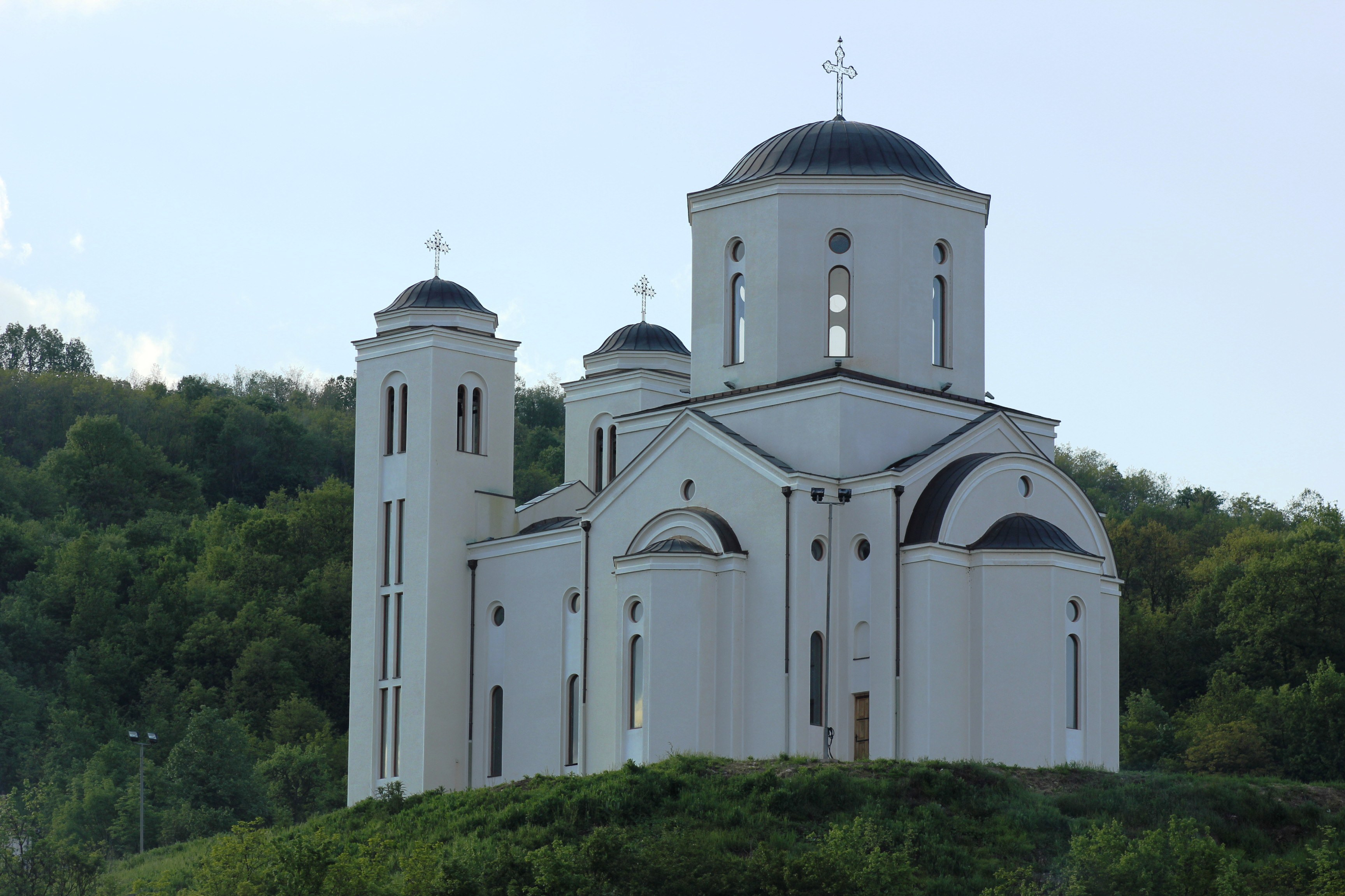 Черква „Св. княз Лазар" в град Владичин хан, Сърбия.